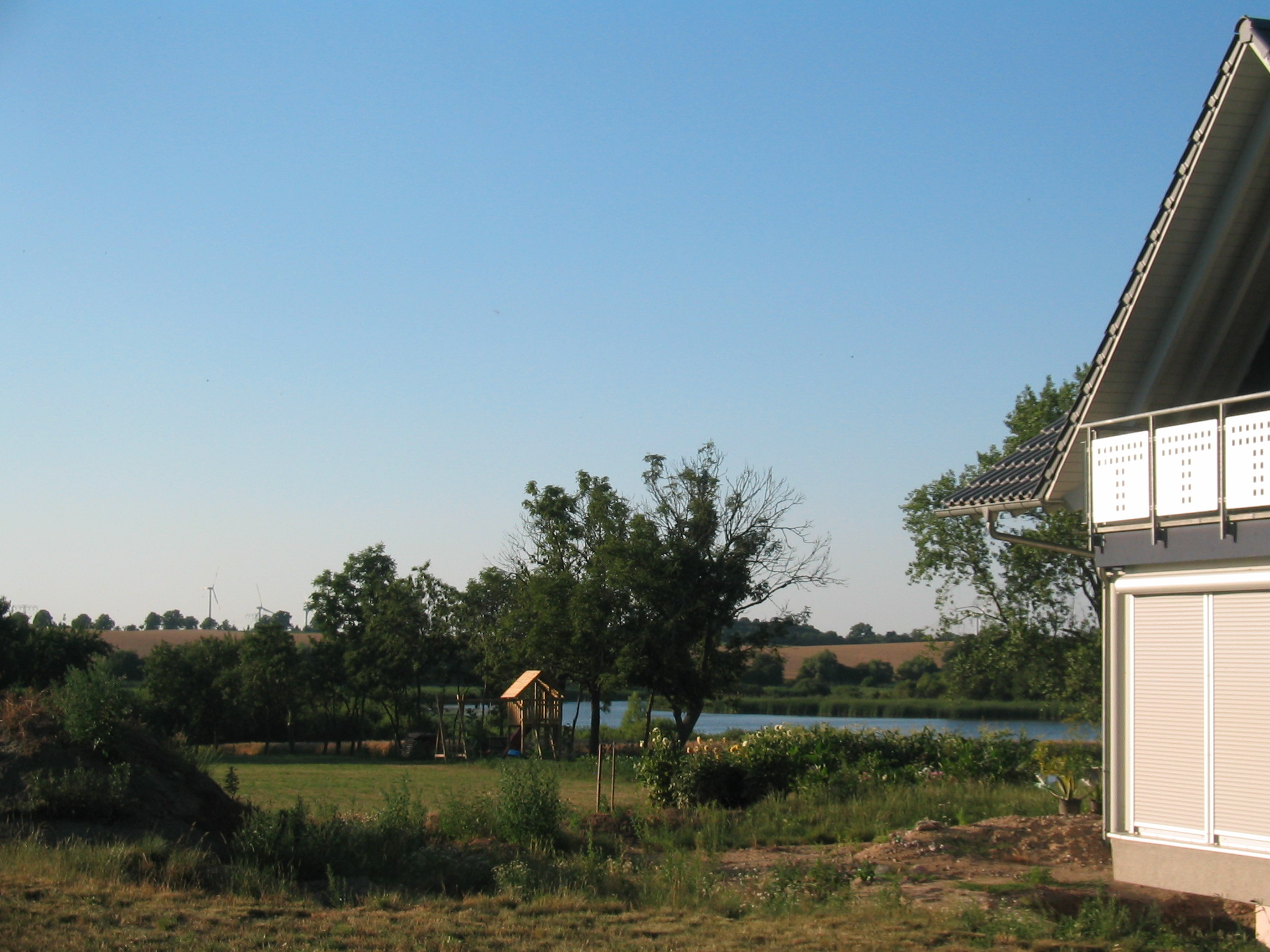 Der Baumgartener See in Baumgarten. See unzugänglich.